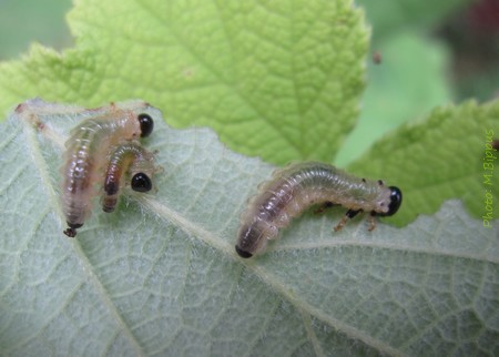 Cibdela janthina' larvae on Rubus alceifolius leaf